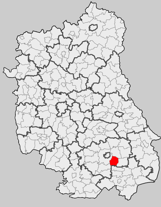 Map of gmina Łabunie, Zamość county, Lublin voivodship Mapa gminy Łabunie, powiat zamojski, województwo lubelskie